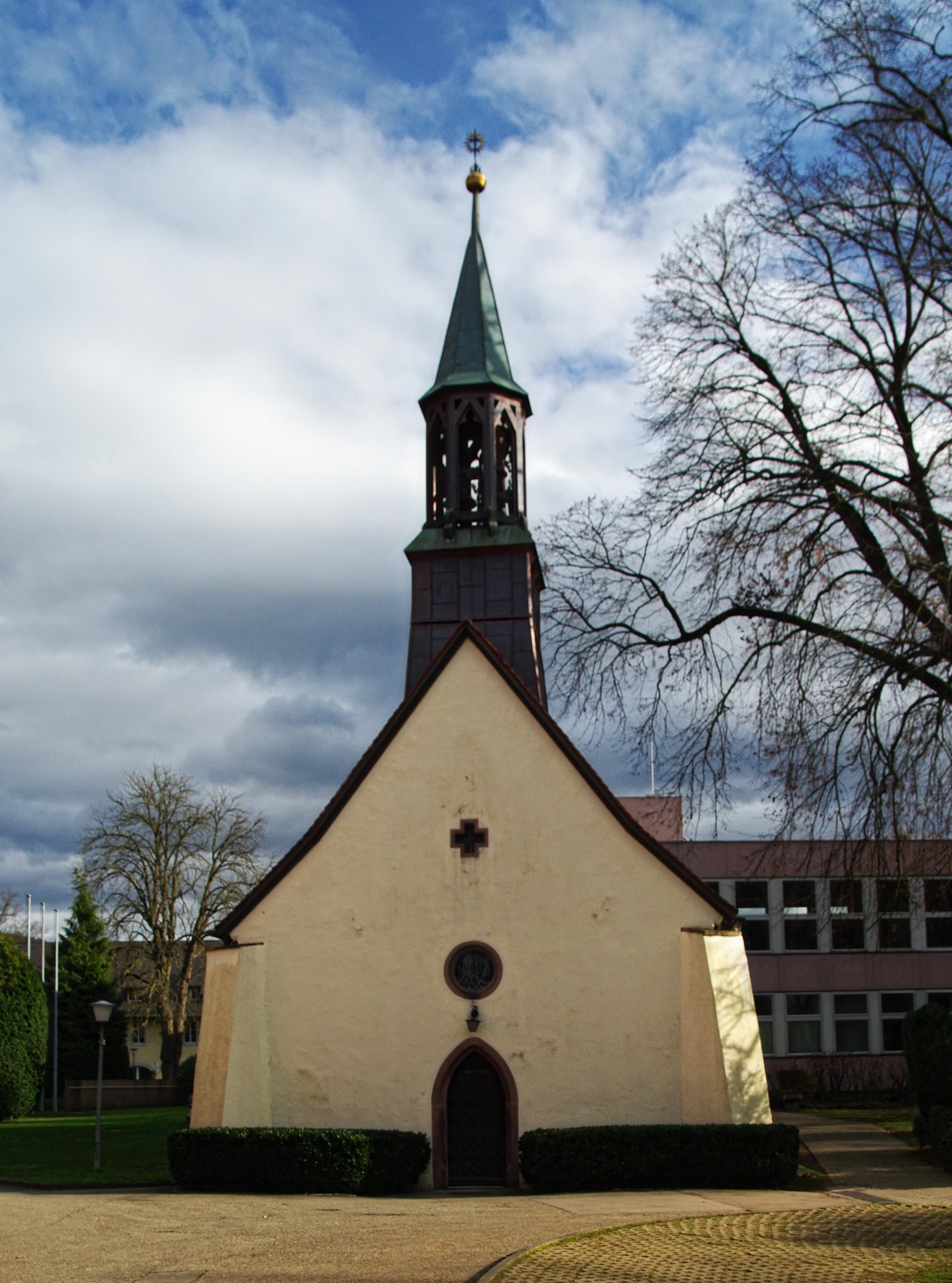 Die Schloßkapelle die St Sebastian geweiht ist